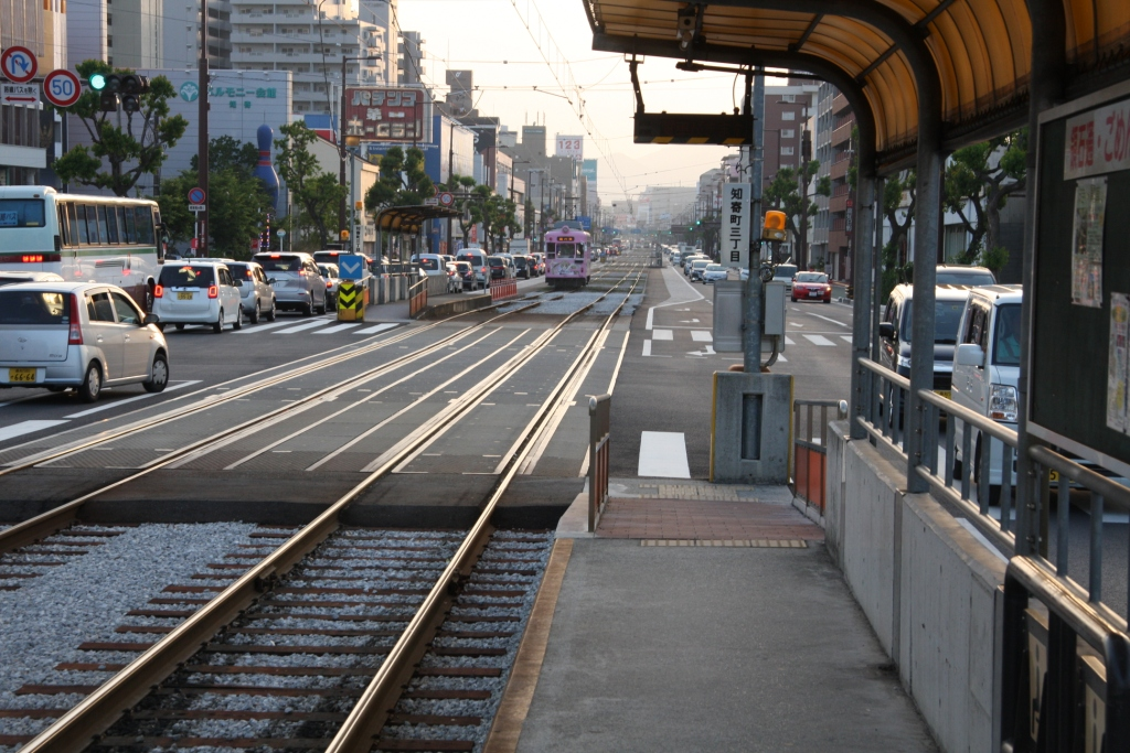 知寄町三丁目停留場